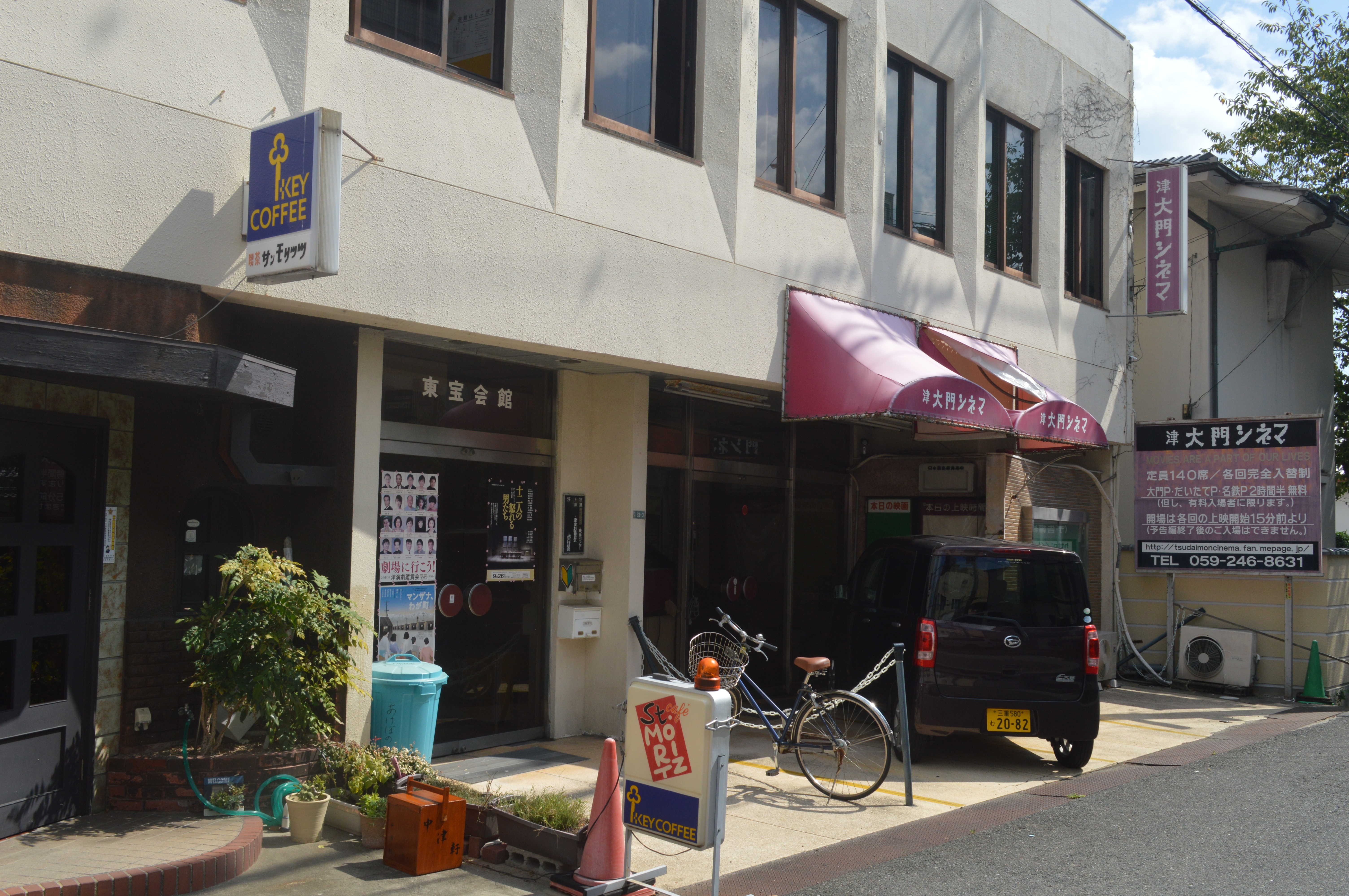 三重県津市にあった映画館「津大門シネマ」。2001年閉館。